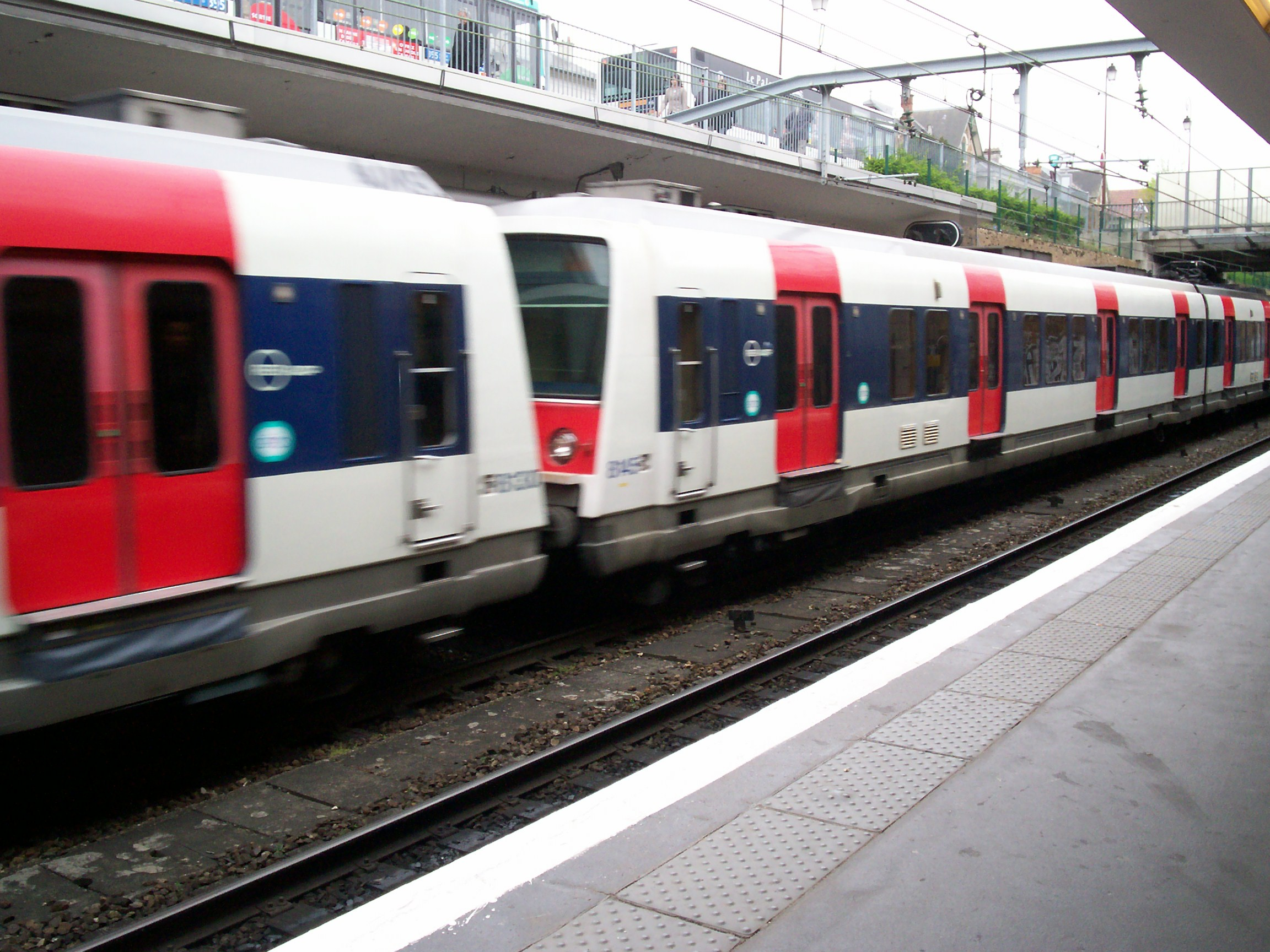 Gare d'Antony